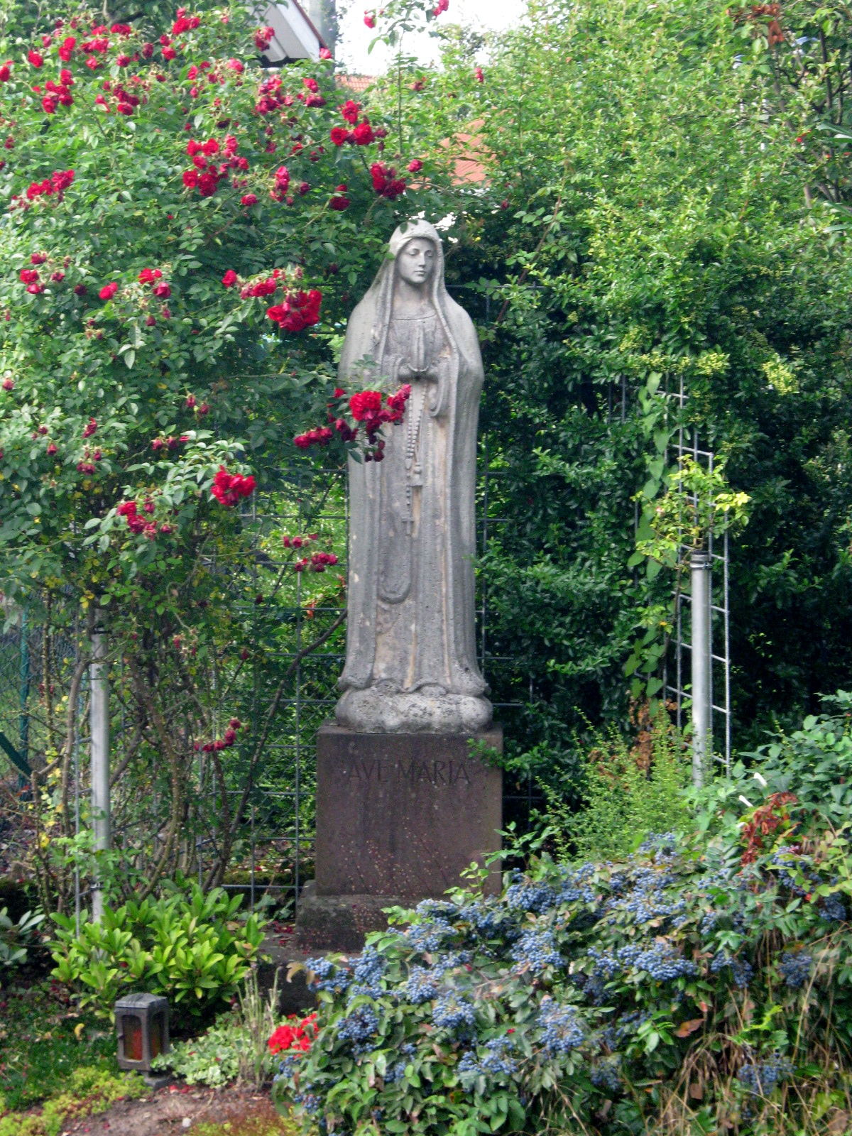 Marienstatue in Baden-Baden Balg